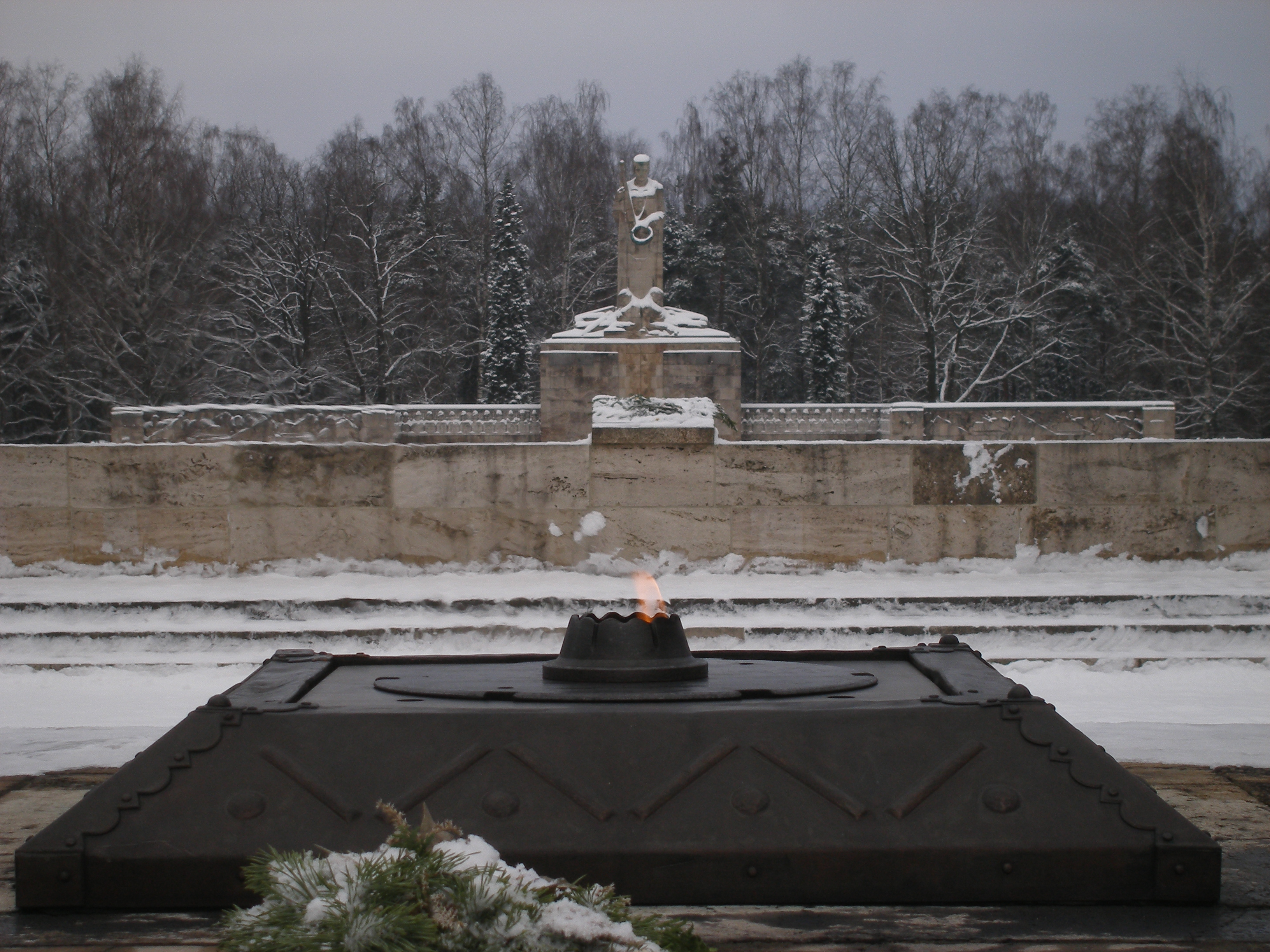 Brāļu kapu siena ar Māti Latviju (priekšplānā Mūžīgā uguns)